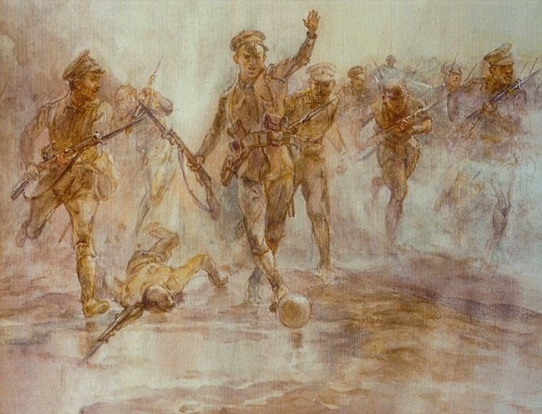 Elizabeth Southerden Thompson, Lady Butler (1846-1933). A London Irish at Loos (1916)